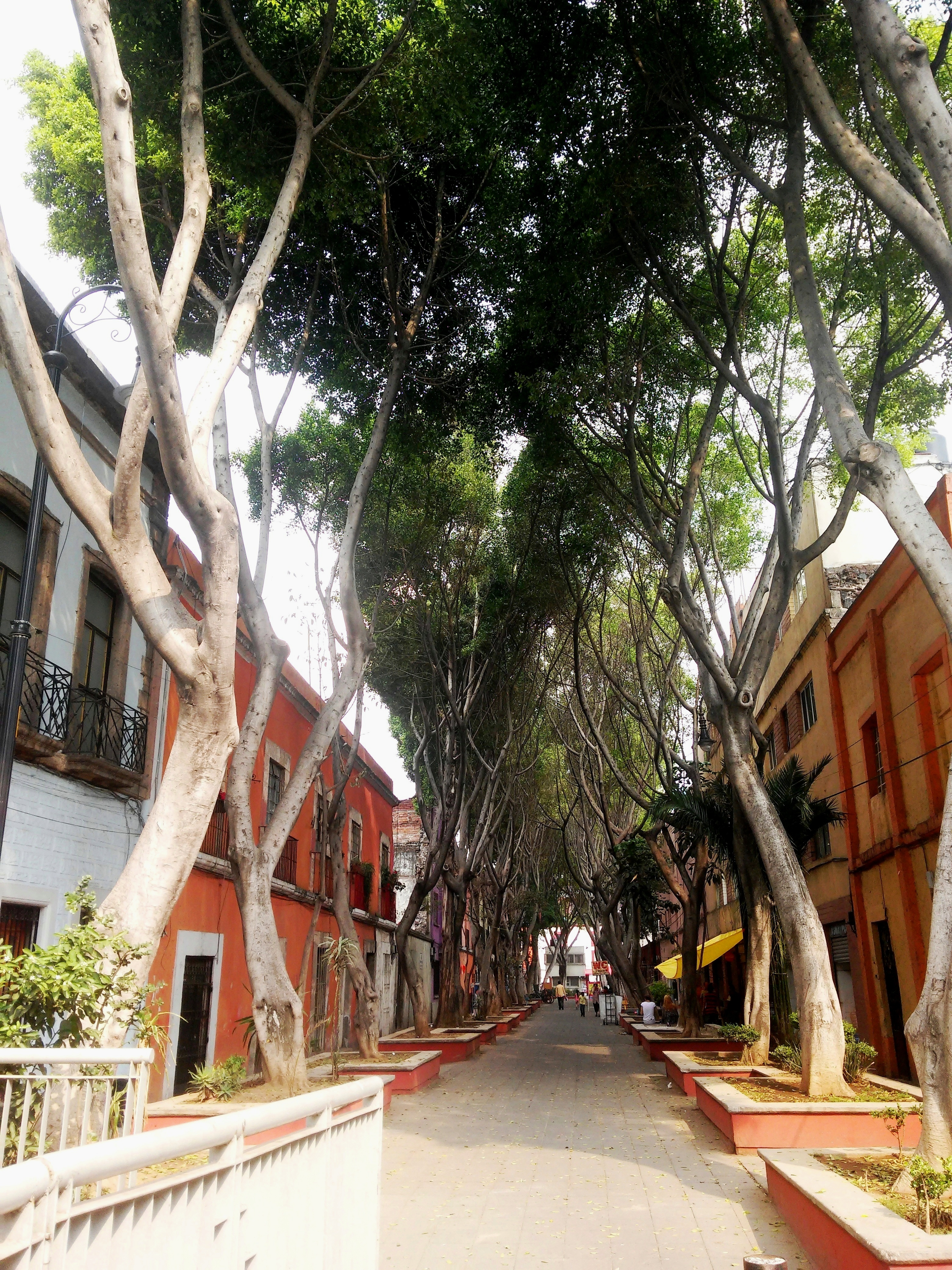 Calle Mariana Rodriguez del Toro de Lazarín en el Centro histórico de la Ciudad de México